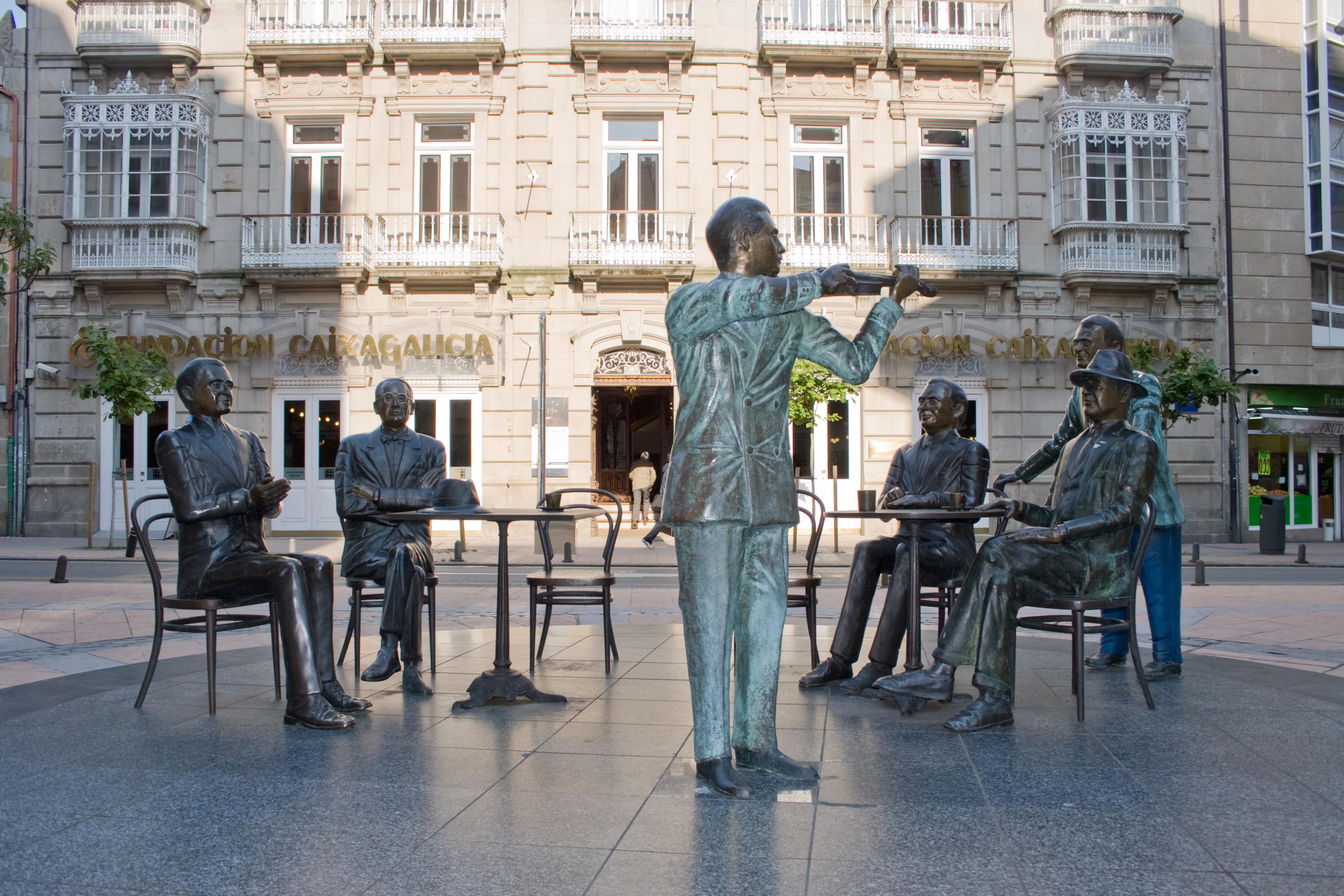 Statues of Alexandre Bóveda (1903-1936), Alfonso Daniel Rodríguez Castelao (1886-1950), Manuel Quiroga (1892-1961 [with violin]), Valentín Paz-Andrade (1899-1987), Carlos Casares (1941-2008) and Ramón Cabanillas (1876-1959), by César Lombera in Saint Joseph Square, Pontevedra (Pontevedra, Galicia).